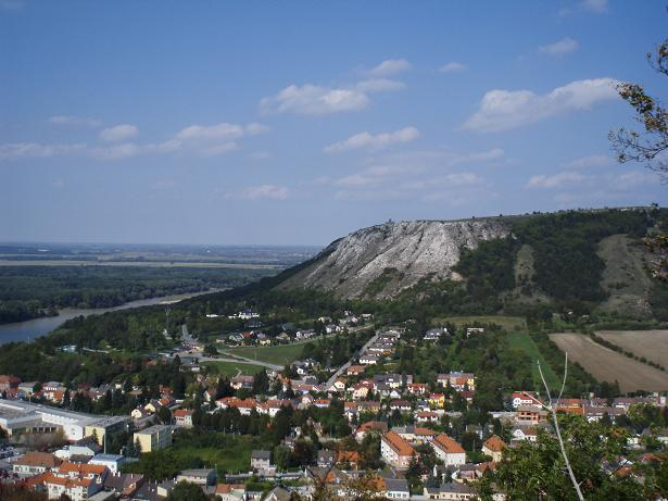 Hainburg- pohľad z hradu